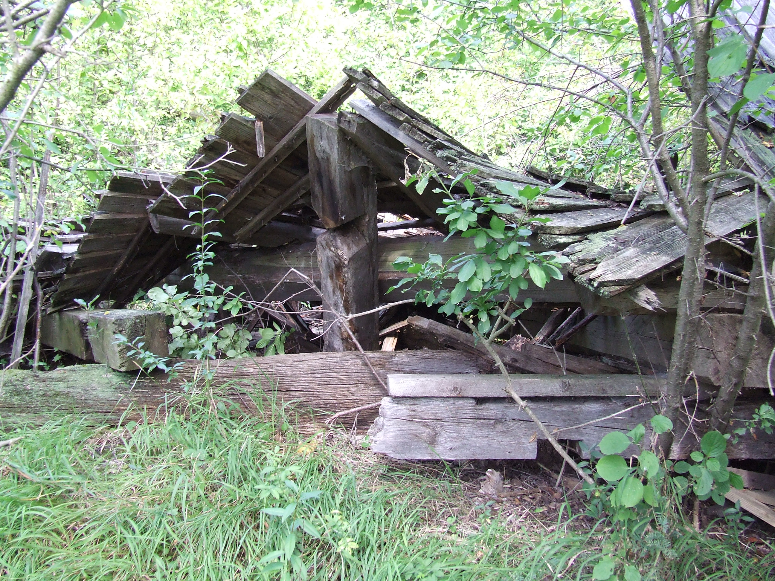 Biserica de lemn din Macău, judeţul Cluj.